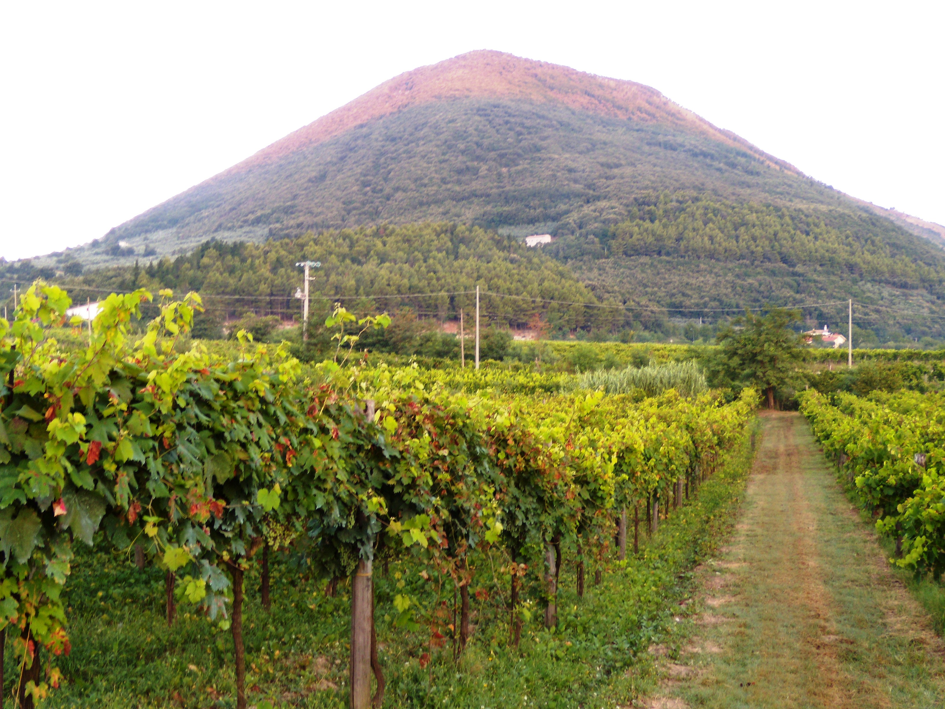 Monte Acero a Faicchio all'inizio del mattino.